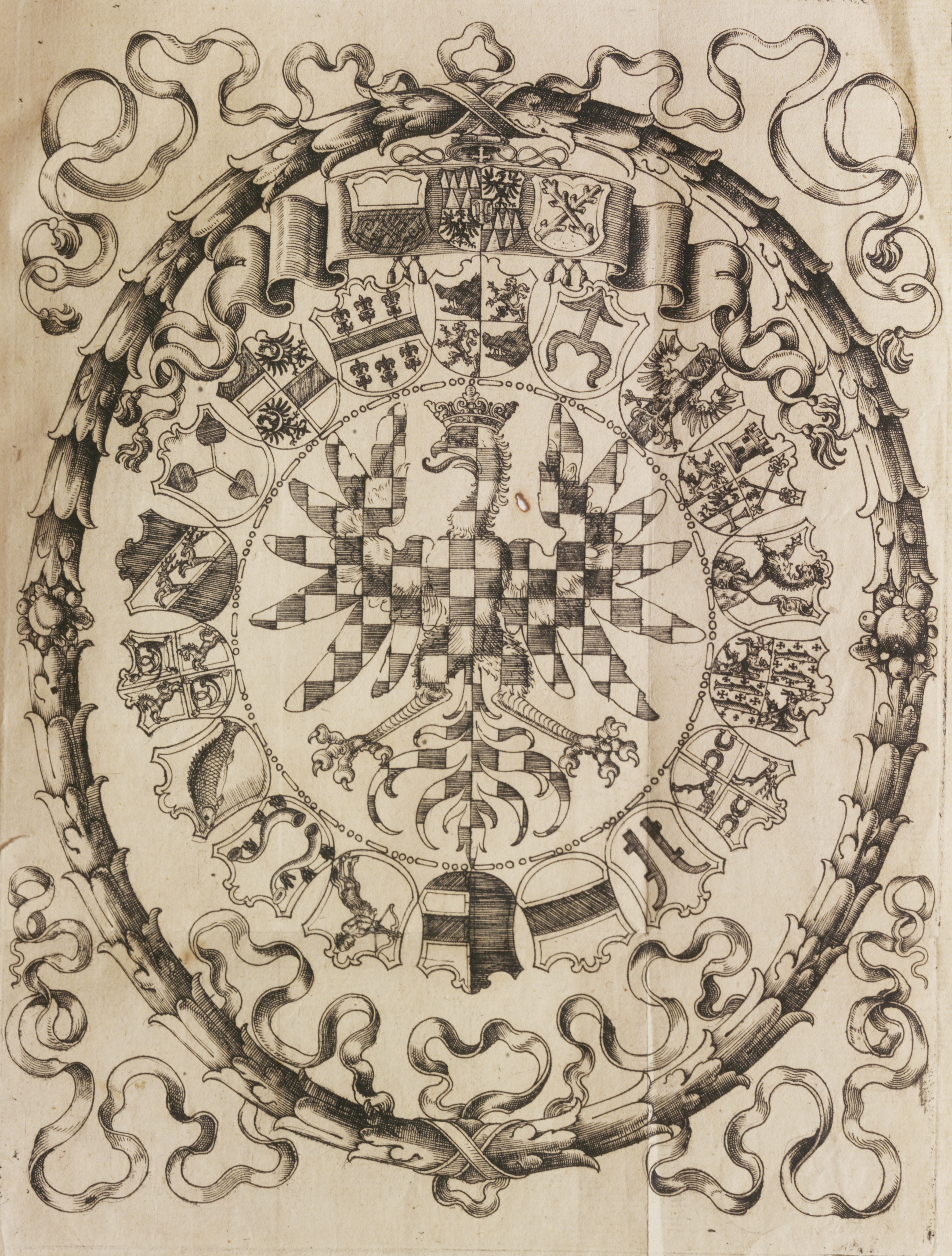 MZA v Brně, G 21 Staré tisky, sign. III-524, znak Moravy ve zřízení zemském Markrabství moravského z roku 1604